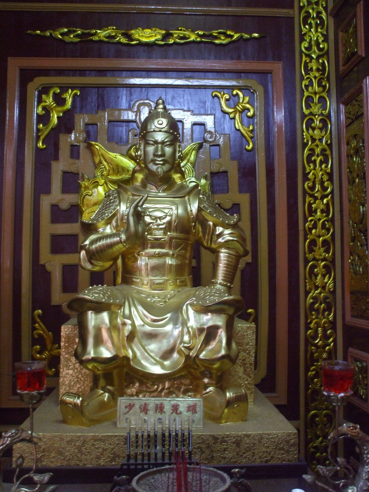 Tượng thờ Trần Quang Diệu trong Điện thờ Tây Sơn Tam Kiệt (Bảo tàng Quang Trung, Bình Định, Việt Nam)